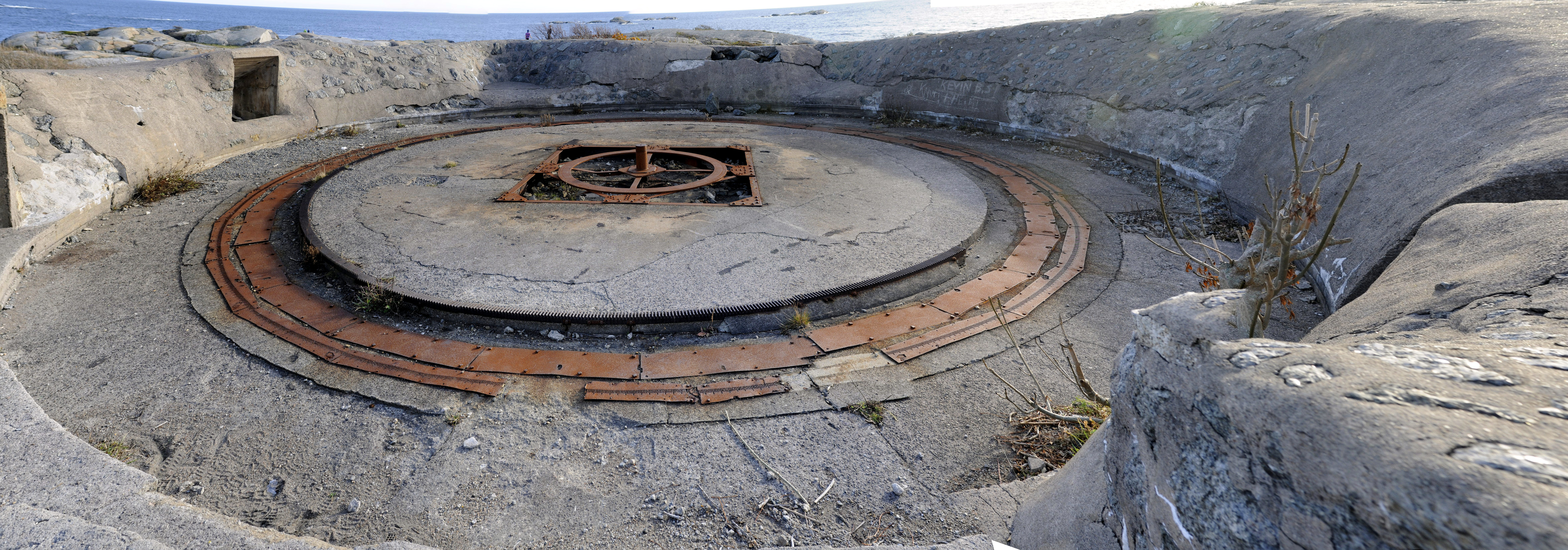 Den eneste gjennværende umodifiserte tyske kanonstillingen ved Folehavna fort.